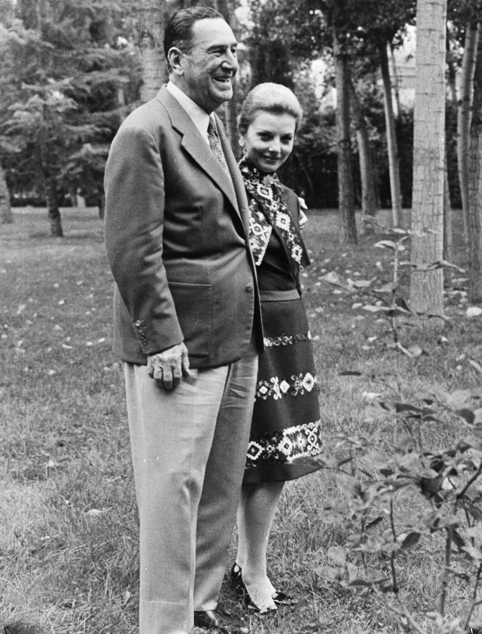 Collectie / Archief : Fotocollectie Anefo Reportage / Serie : [ onbekend ] Beschrijving : Ex-President Juan Domingo Perón van Argentinië; Perón en zijn tweede echtgenote Isabel Martinez de Perón in Spanje Datum : 14 november 1972 Locatie : Spanje Persoonsnaam : Perón, Isabel Martinez de, Perón, Juan Domingo Fotograaf : [onbekend] Auteursrechthebbende : Nationaal Archief Materiaalsoort : Negatief (zwart/wit) Nummer archiefinventaris : bekijk toegang 2.24.01.04 Bestanddeelnummer : 926-0240